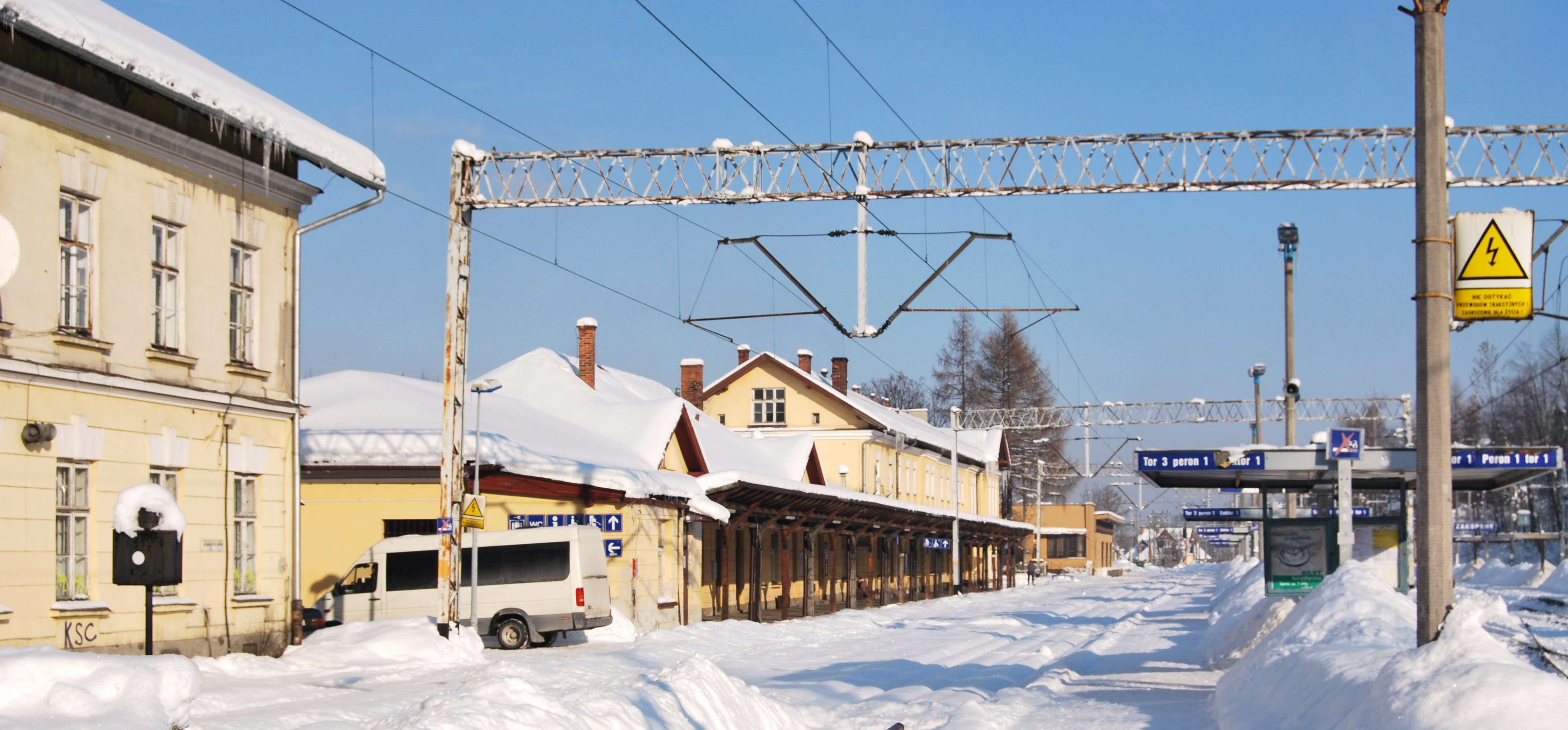 ザコパネ駅（Zakopane）